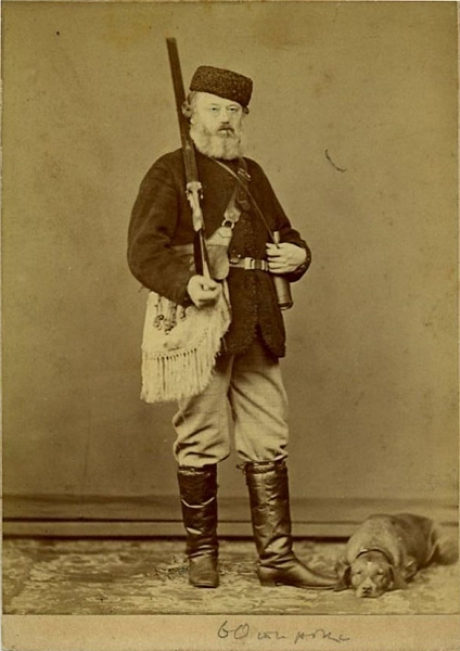 Рыжего пойнтера Милорда В.М. Лазаревский купил у А.П. Степанова за 85 рублей, что было весьма неплохой ценой по тем временам. Снимок сделан как раз в те годы, когда Лазаревский и Некрасов охотились вместе, арендуя угодья в Чудовской Луке.